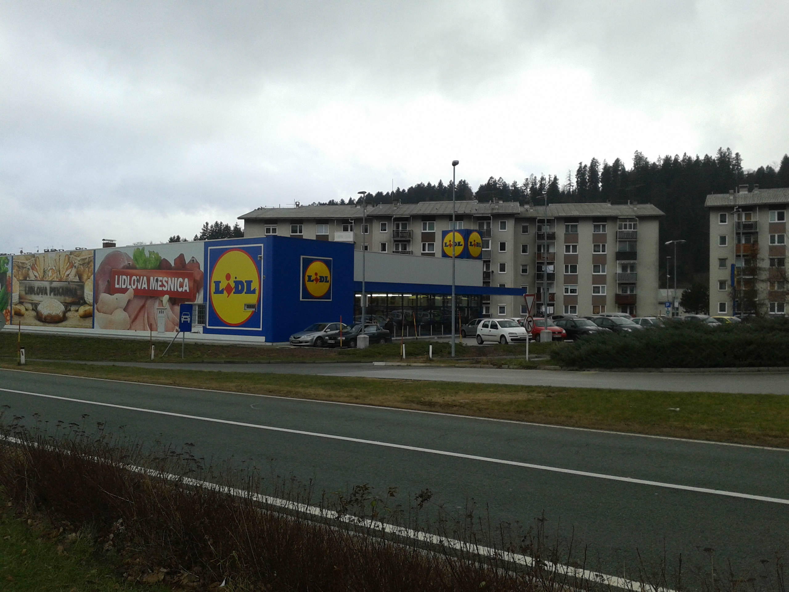 Bistrica pri Tržiču, umeščenost Lidlove trgovine in stanovanjskih blokov ob cesto Podtabor-Ljubelj